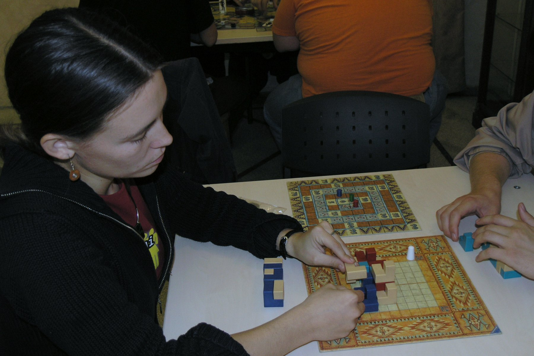 Pueblo (desková hra /board game)